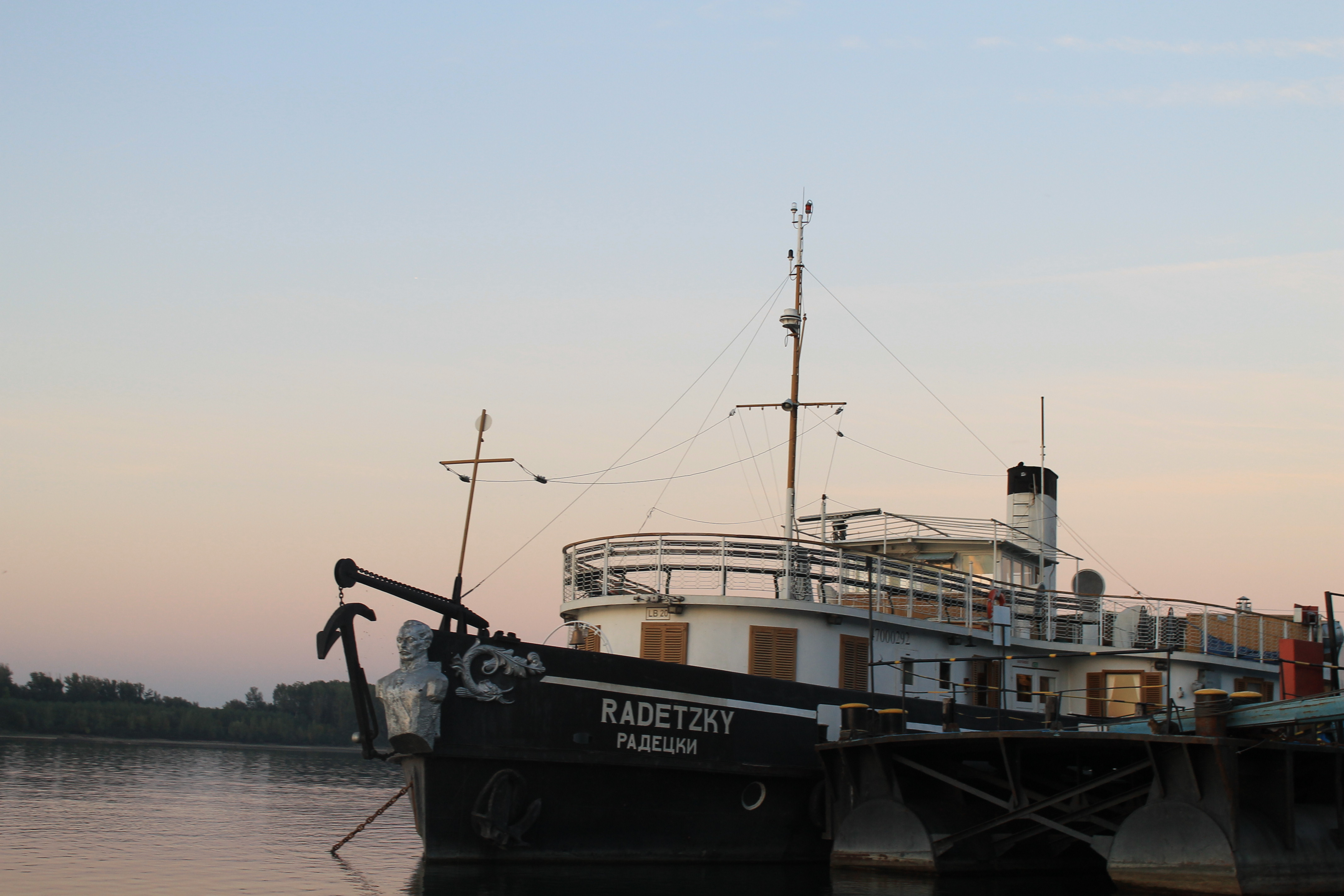 Единственият плаващ музей в България!